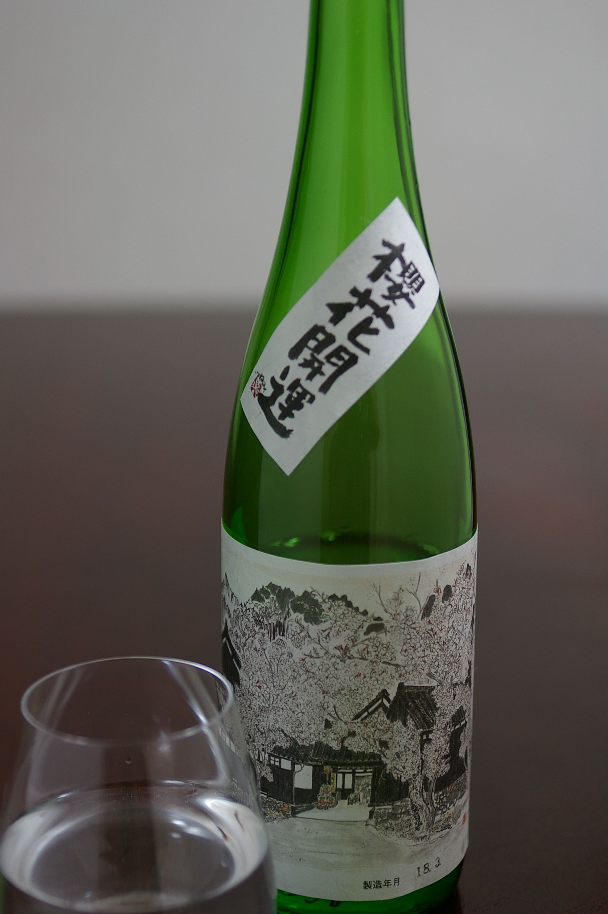 Ouka kaiun